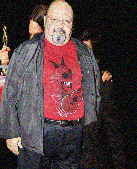 Carlos Cobos 2011, es reconocido contemporaneamente por Pastorela